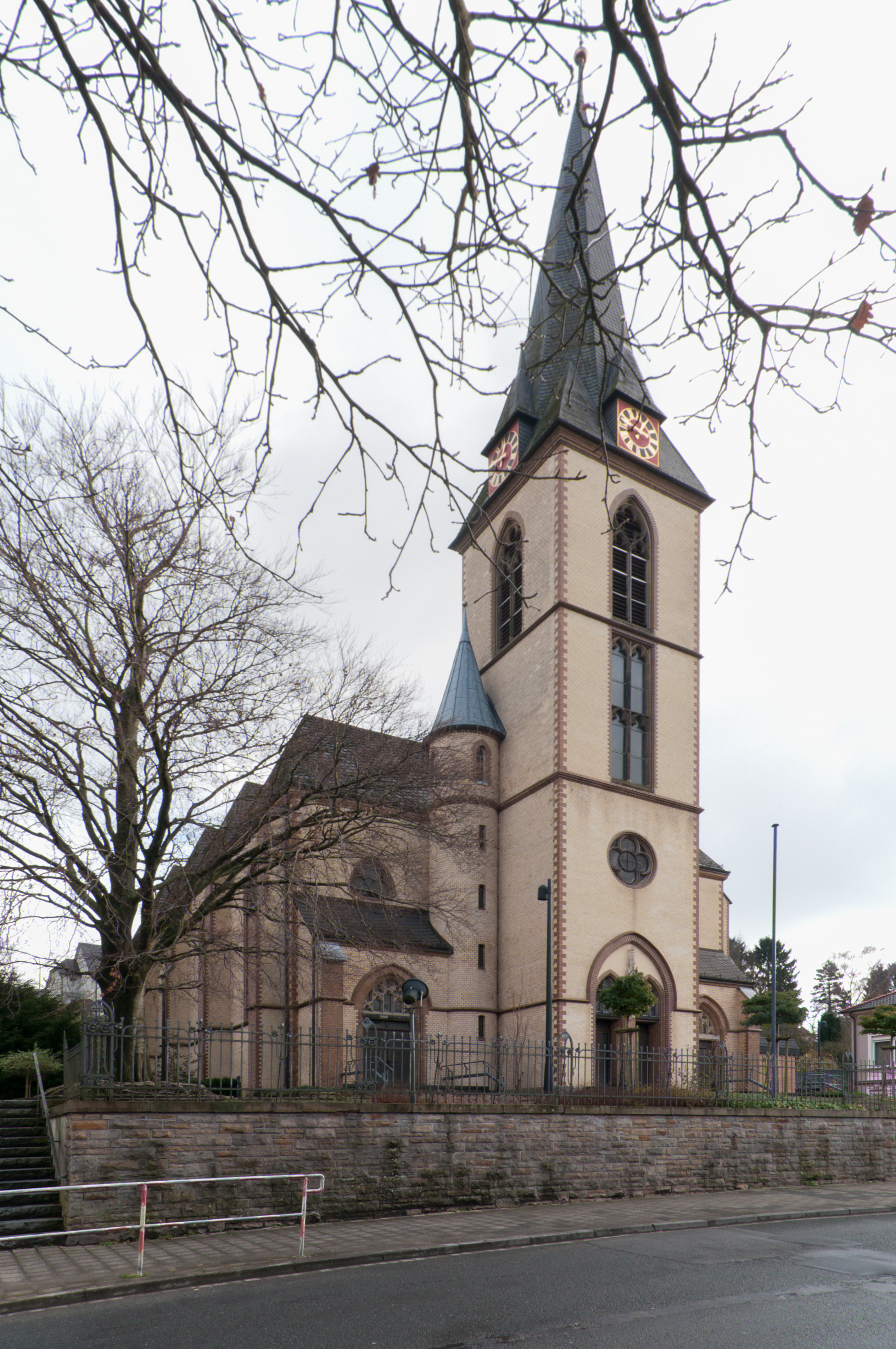 Oeventrop, Pfarrkirche Heilige Familie, Ansicht von Nord-West; Denkmalliste Stadt Arnsberg Nr. 136